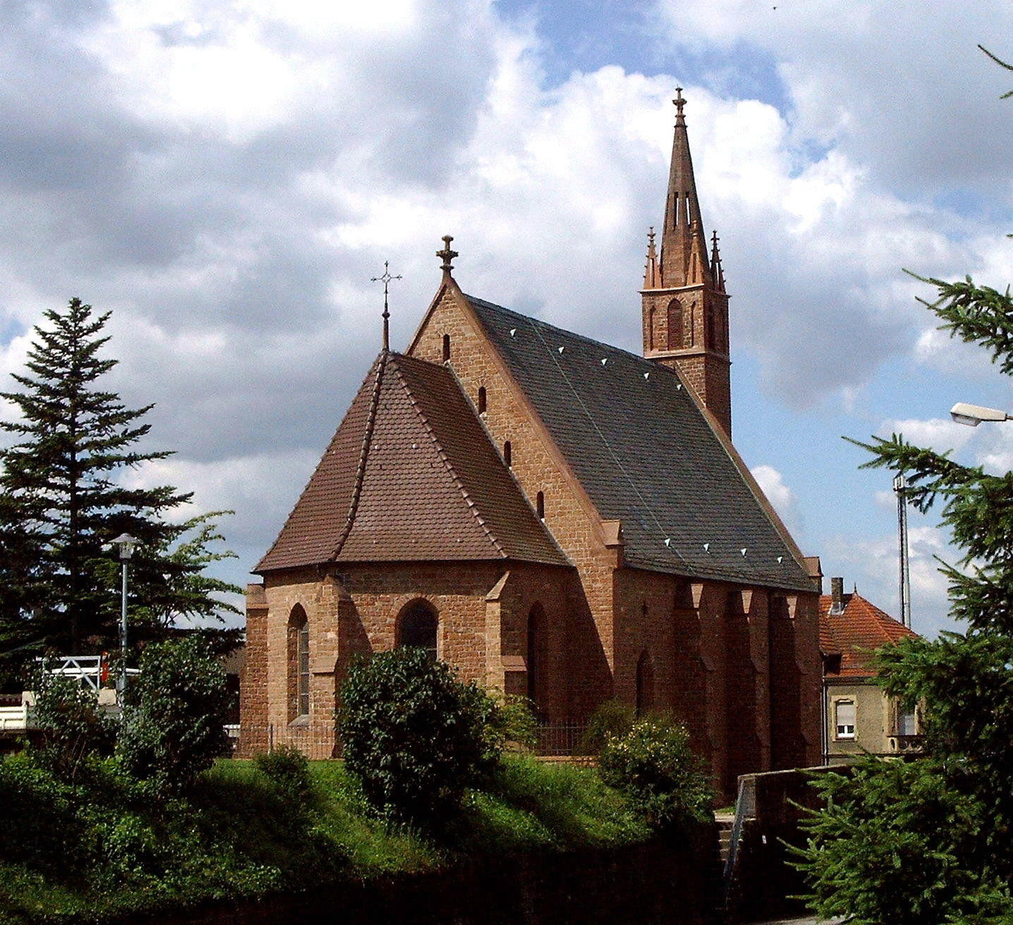 Rochuskapelle von der Rochusstraße aus gesehen